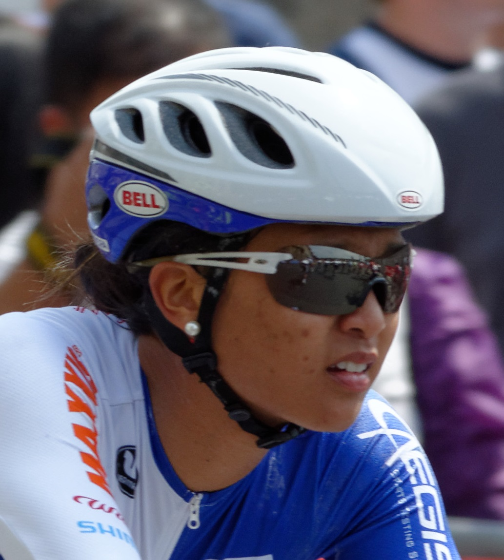 Coryn Rivera, La Course by Le Tour de France 2014